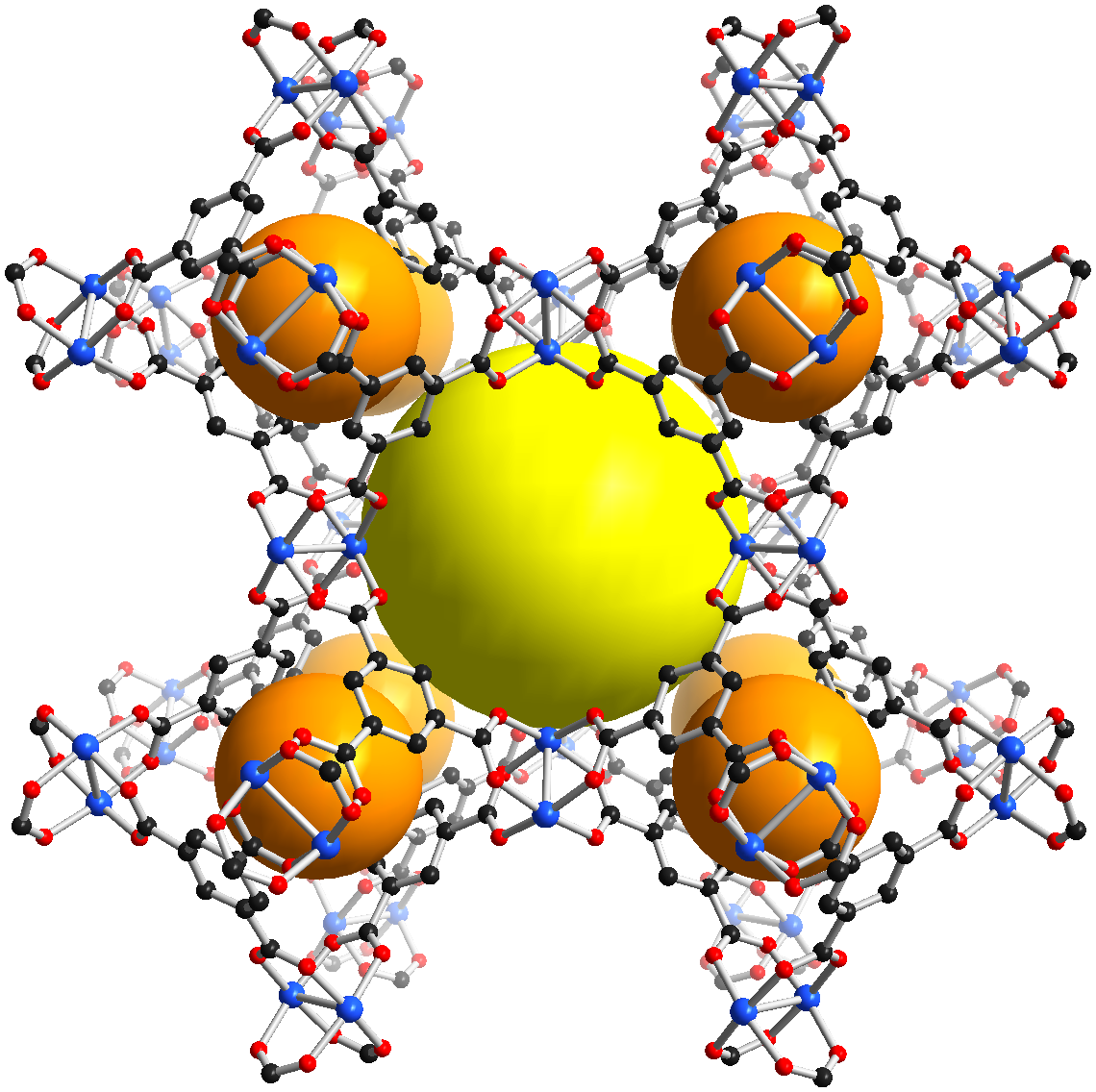 Ausschnitt aus der Kristallstruktur von HKUST-1 im aktivierten Zustand. Die farbigen Kugeln deuten die in der Struktur vorhandenen Poren an.